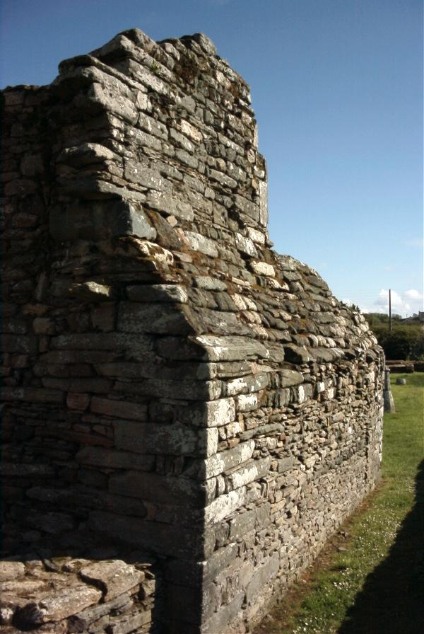 Languidou : facade occidentale.